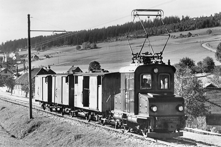 Lokomotive Ge 2/2 Nr. 5 der Tramelan–Breuleux–Noirmont-Bahn (TBN) in Tramelan Dessous.